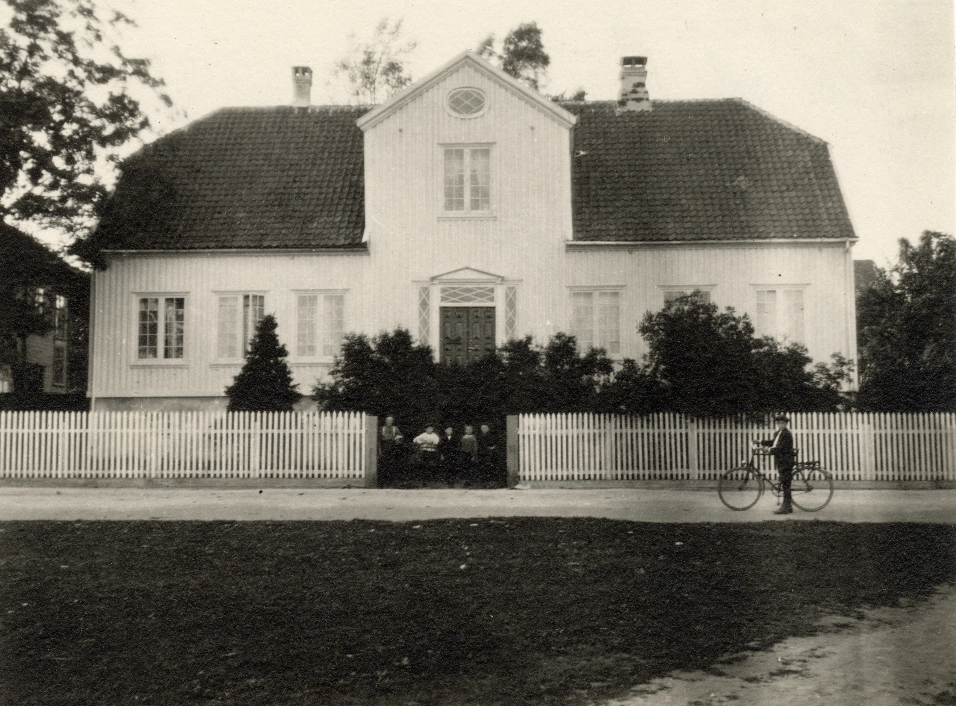 Skrivergården i Lillesand, Aust-Agder